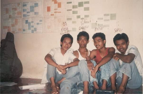 Foto Mas Rofik bersama temannya di SMAN 1Purbalingga